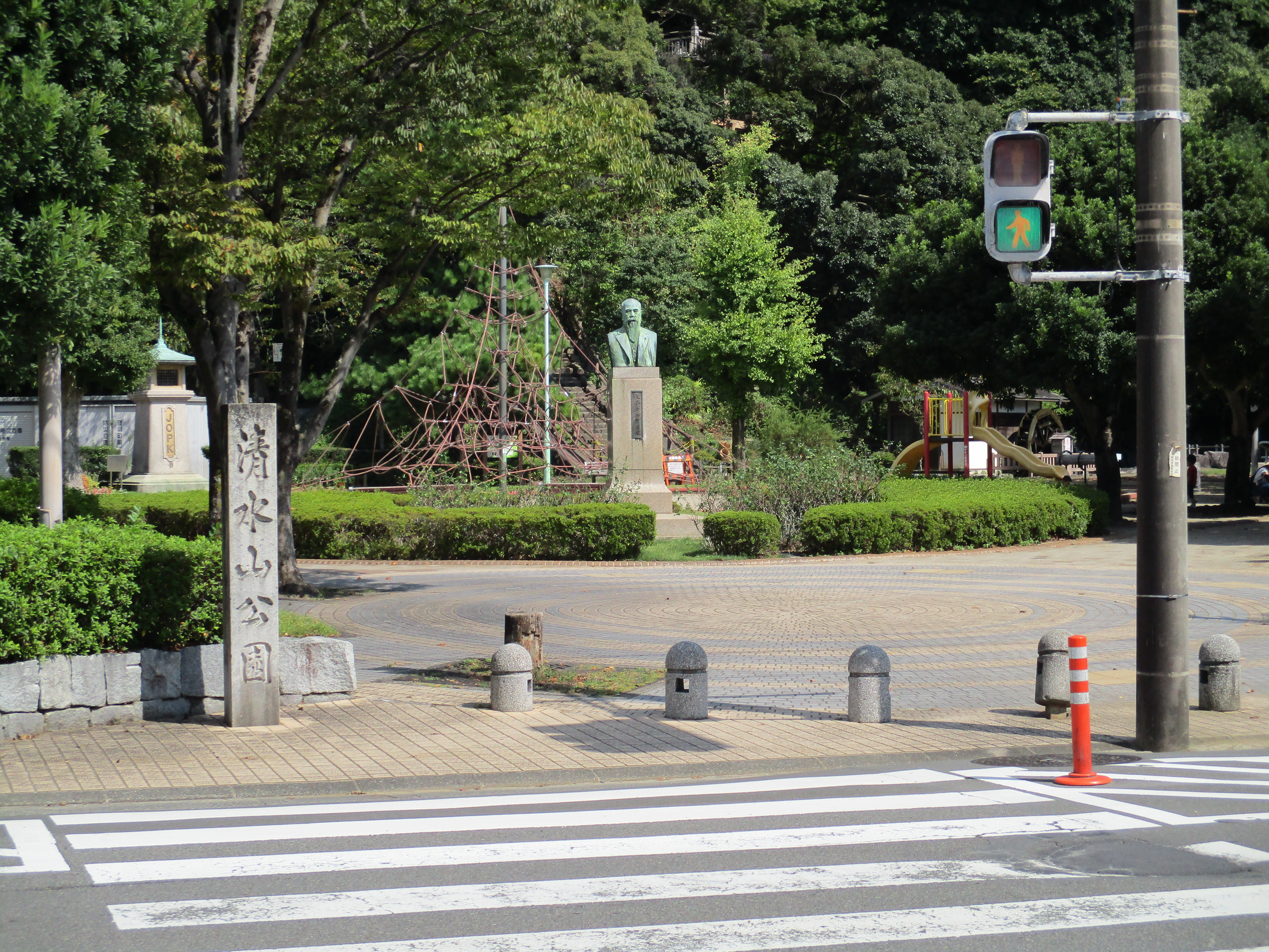 静岡県静岡市葵区にある清水山公園